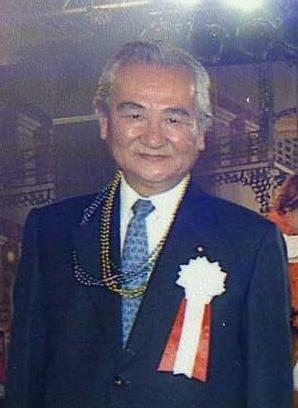 Koki Chuma.